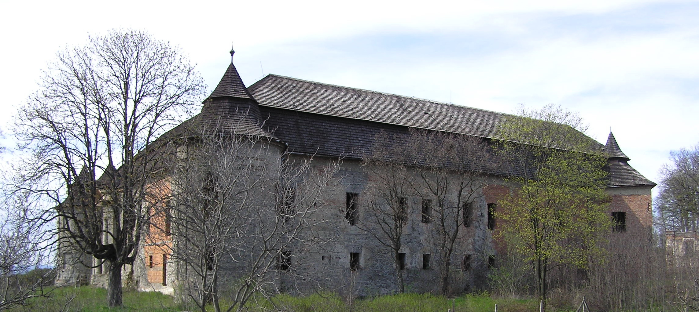 Kaštieľ Ožďany